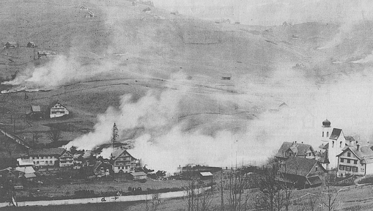 Am 29. März 1947 wurden beim Dorfbrand von Stein, dem letzten grossen Dorfbrand in der Schweiz, 35 Gebäude zerstört.